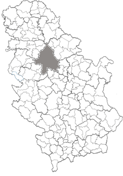 Belgrade